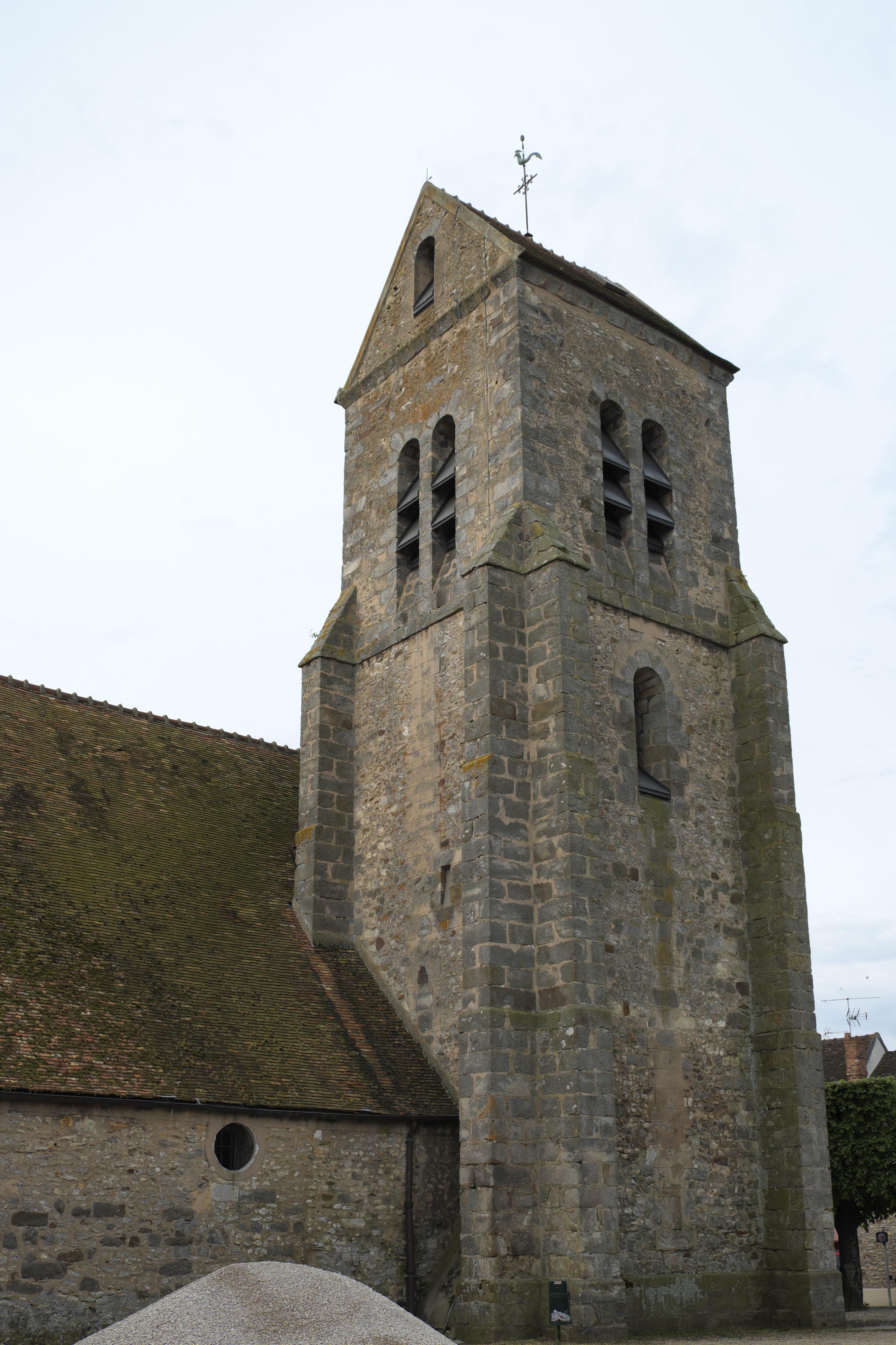 Kirche Saint-Julien in Réau im Département Seine-et-Marne (Île-de-France/Frankreich)